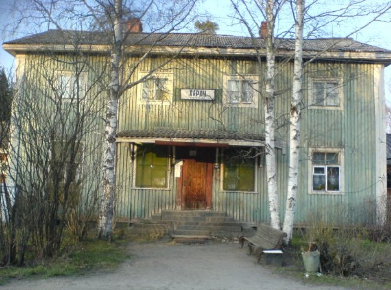 Харлу